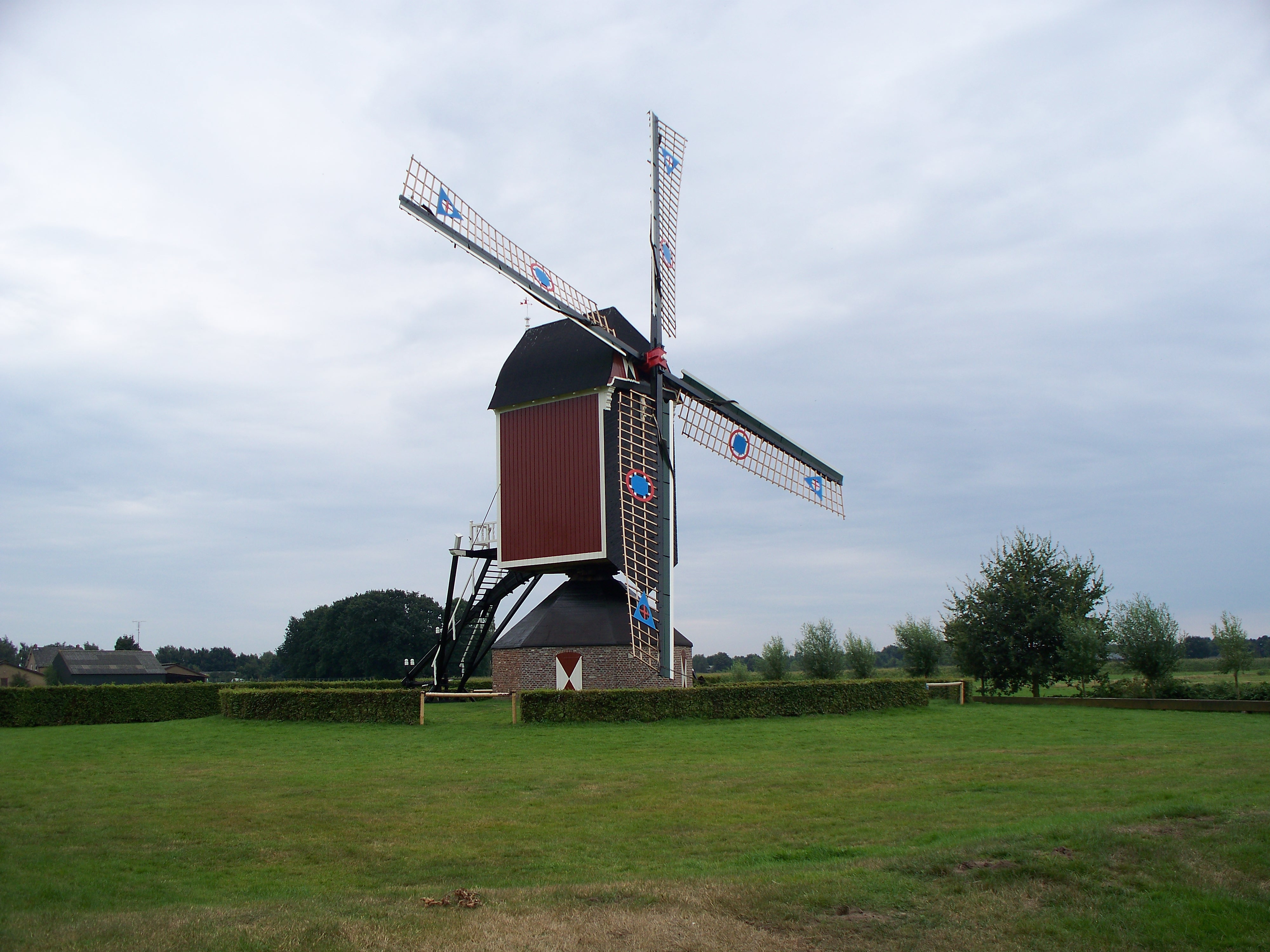 Molen Zeldenrust, Geffen, gemeente Maasdonk